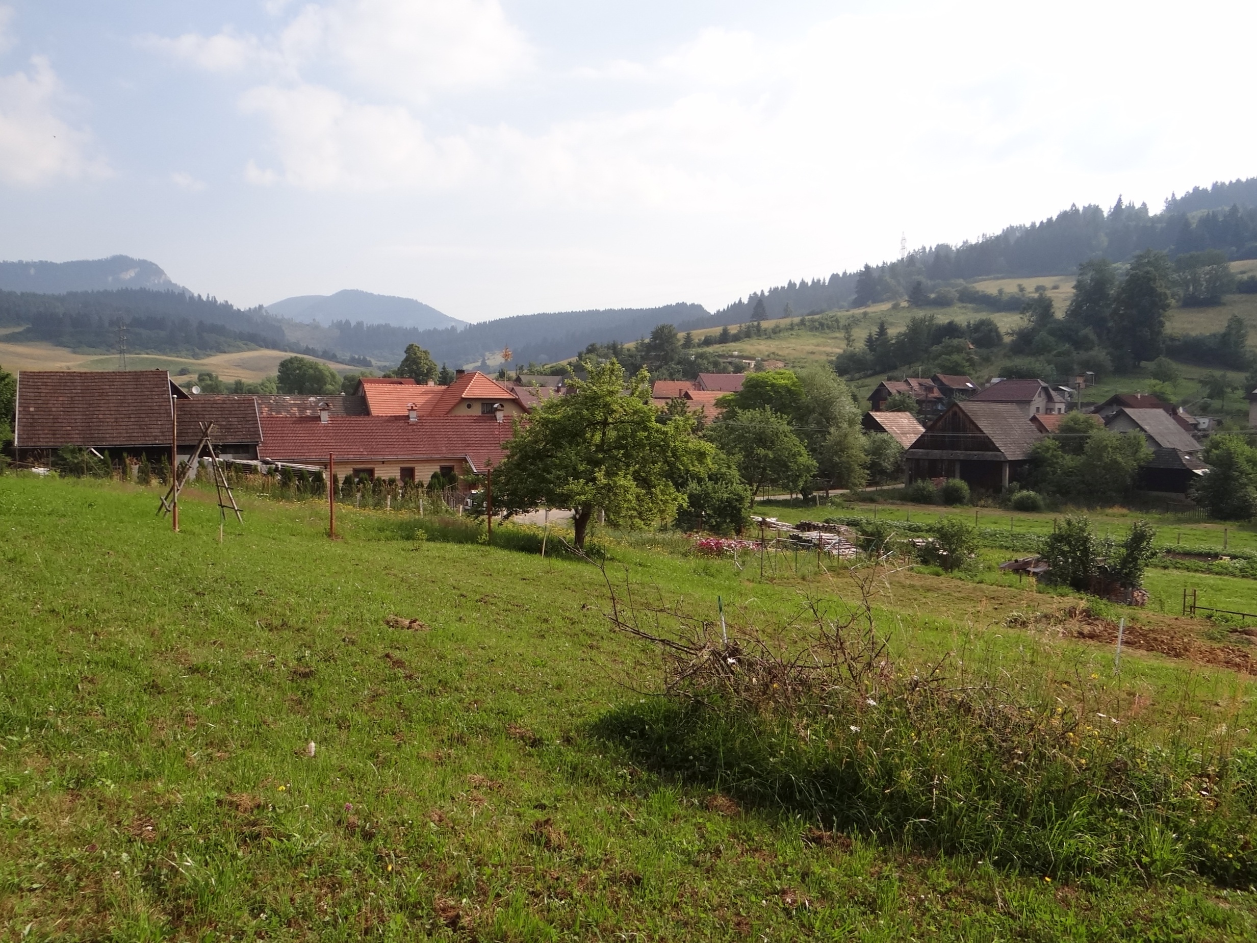 Potok (Slovakia)